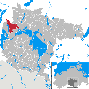 Nossentiner Hütte in Mecklenburg-Western Pomerania - District Müritz